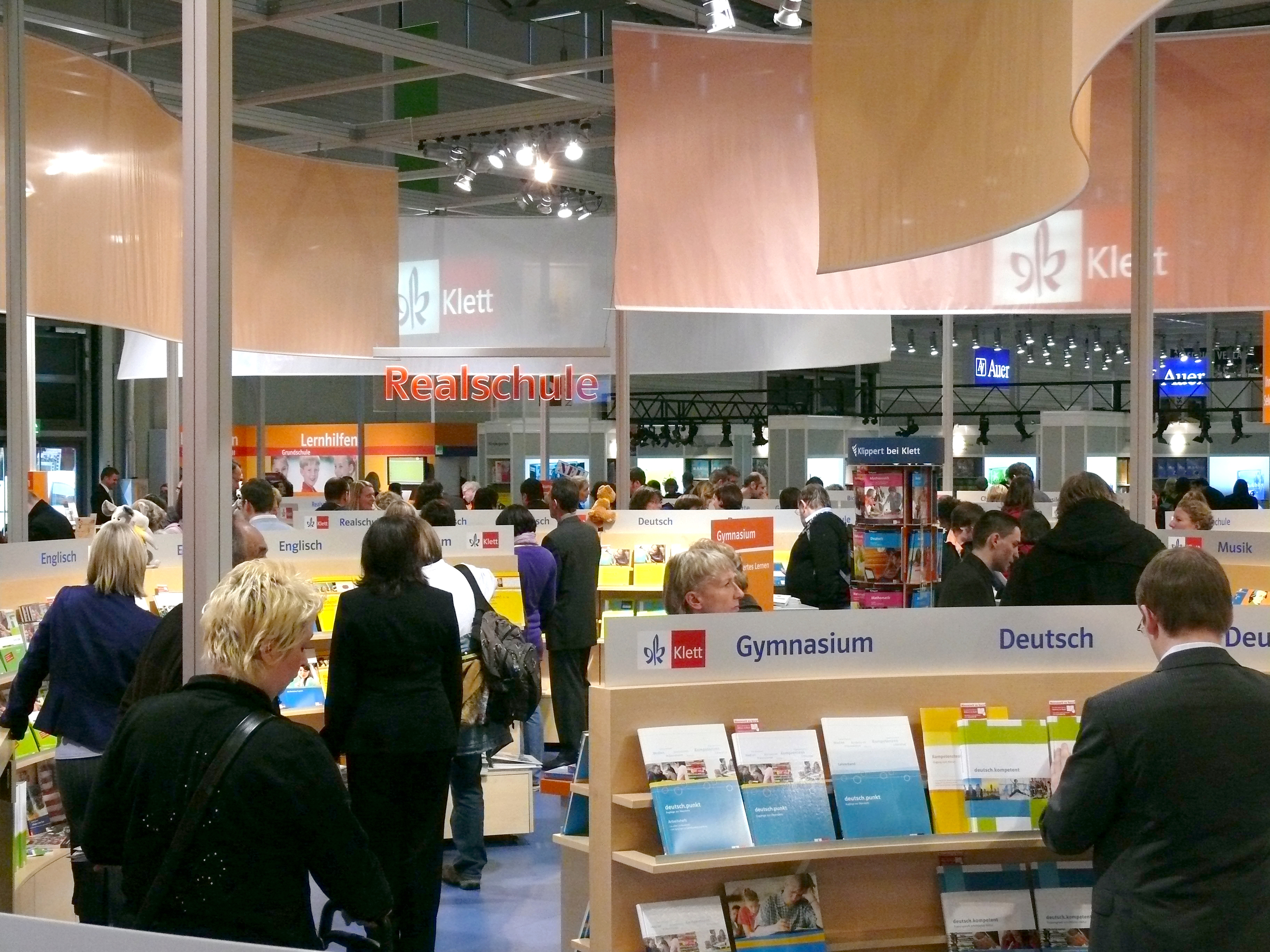 Messestand des Ernst Klett Verlags auf der Didacta 2010, Köln (koelnmesse)